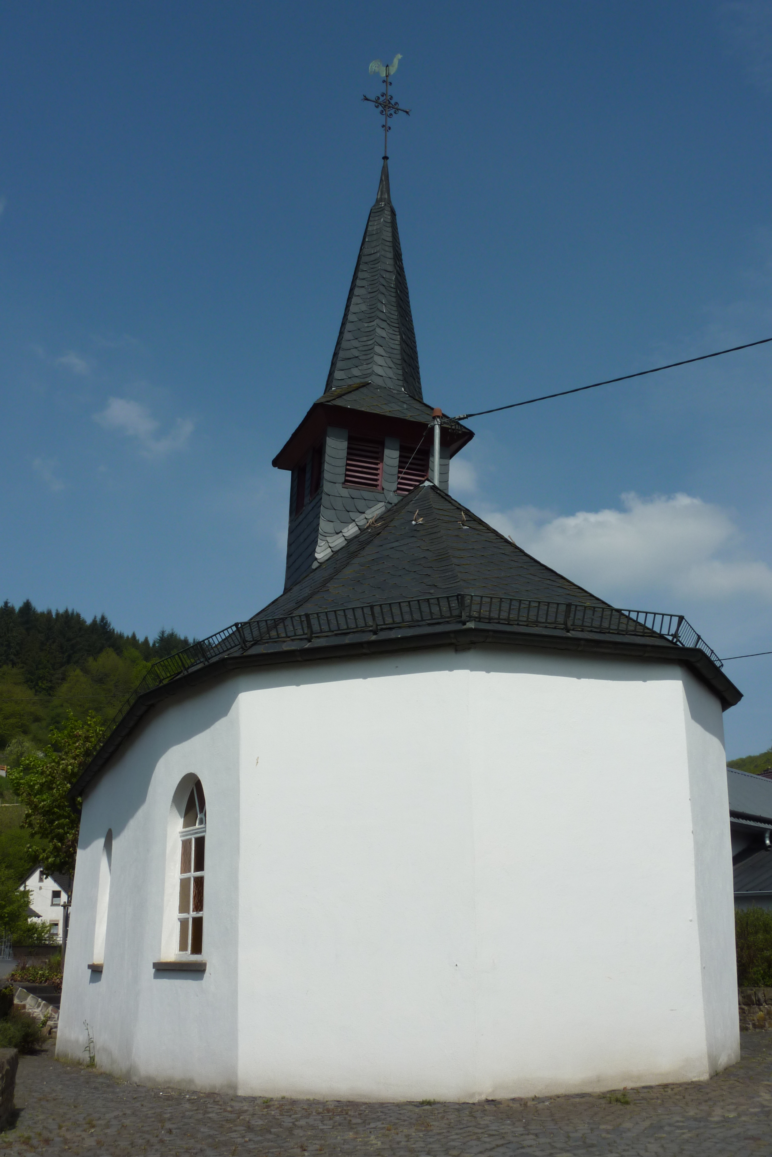 Kapelle St. Hubertus in Acht (Eifel)